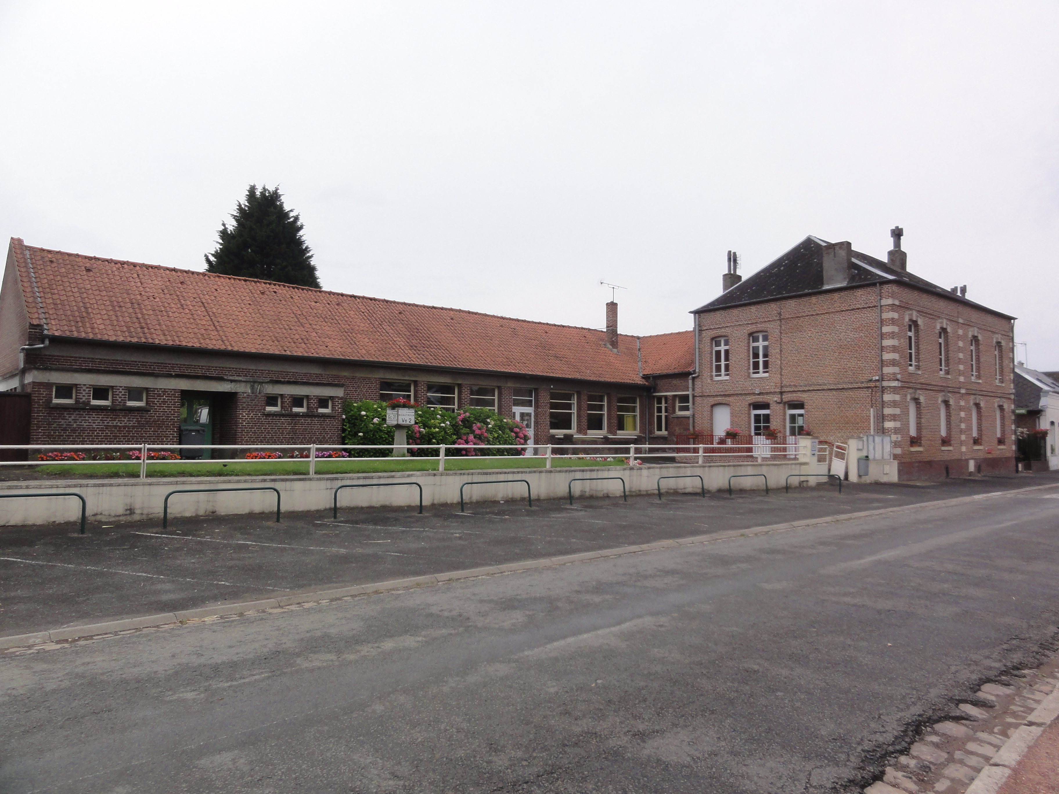 Étaves-et-Bocquiaux (Aisne) école et mairie